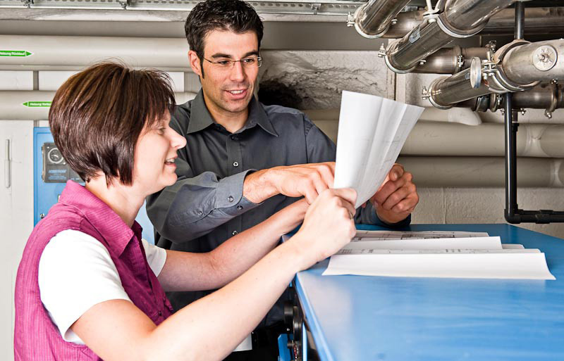 Ein Energieberatungsgespräch bei der ENRW